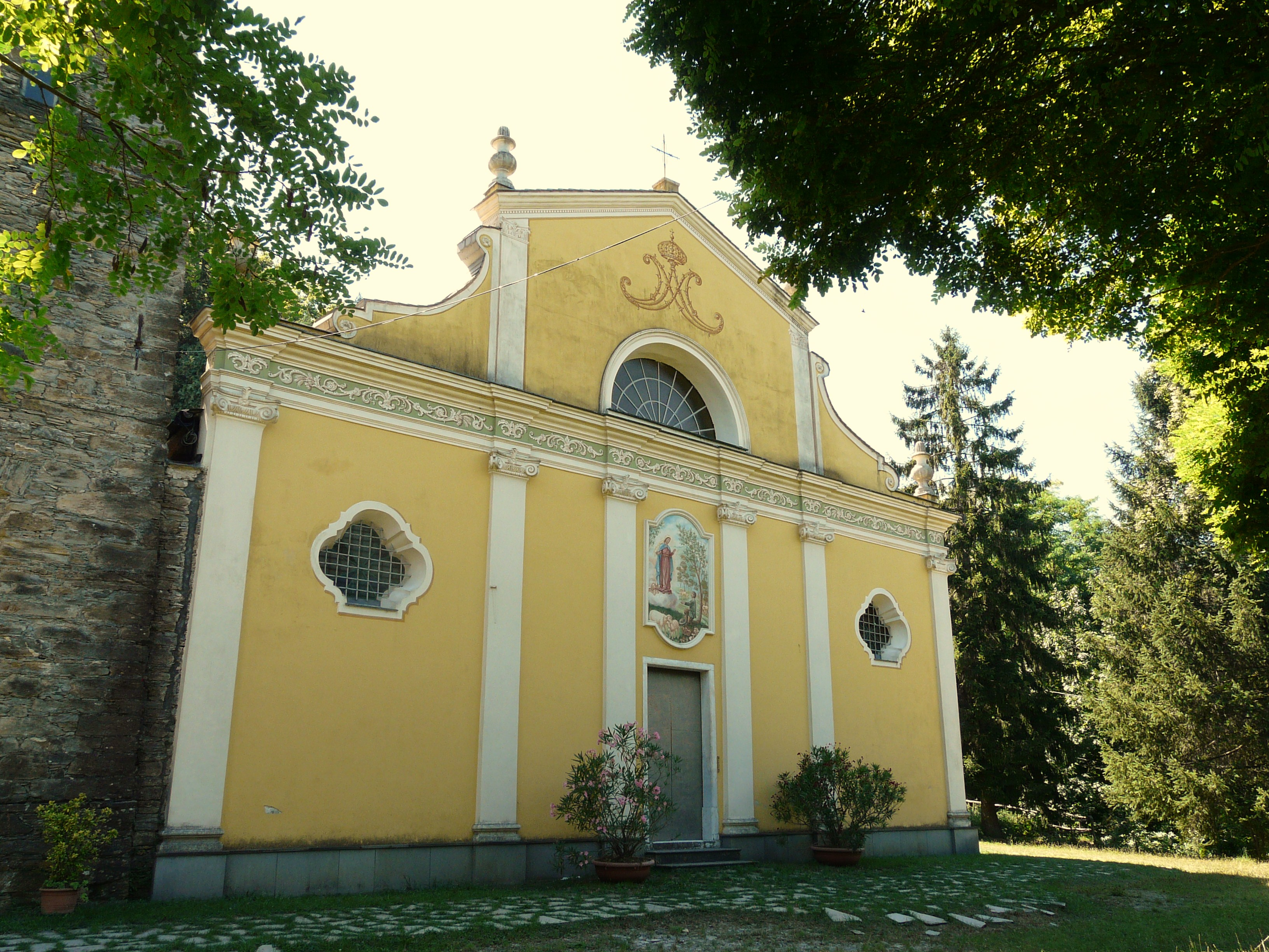 Santuario di Nostra Signora del Bosco, Lumarzo, Liguria, Italia